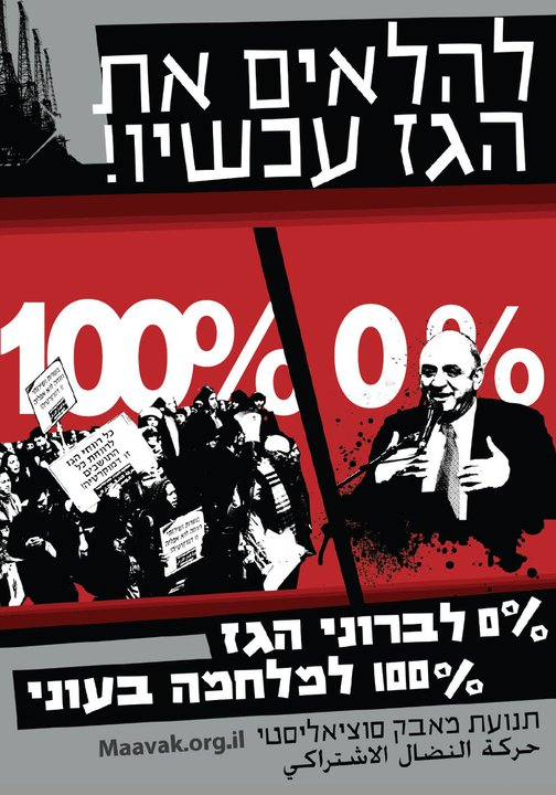 פוסטר של תנועת מאבק סוציאליסטי הקורא להלאמת משאבי הגז, פברואר 2011